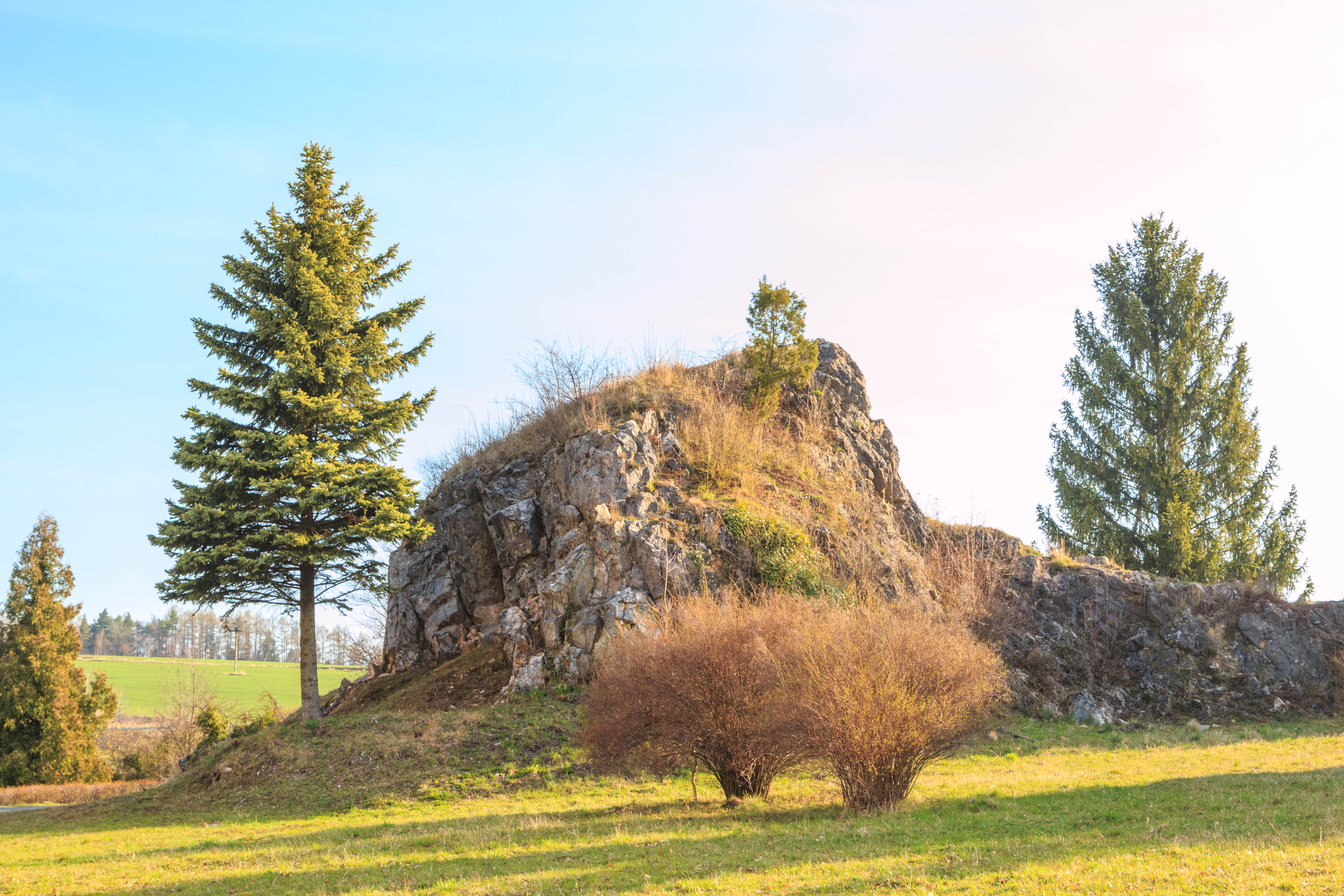 Vápenný Podol - zbytek po těžbě